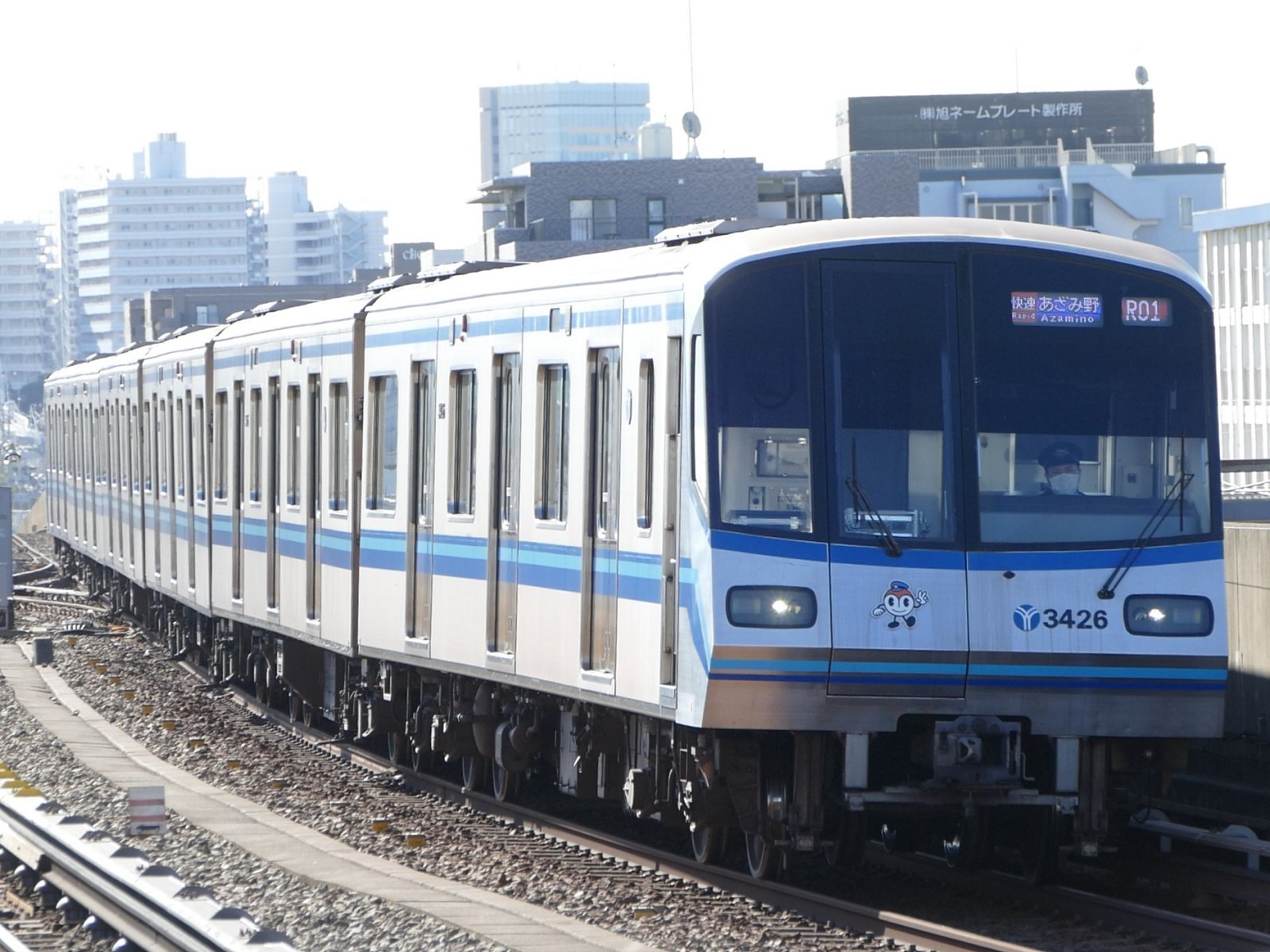 横浜市営地下鉄ブルーライン新羽駅